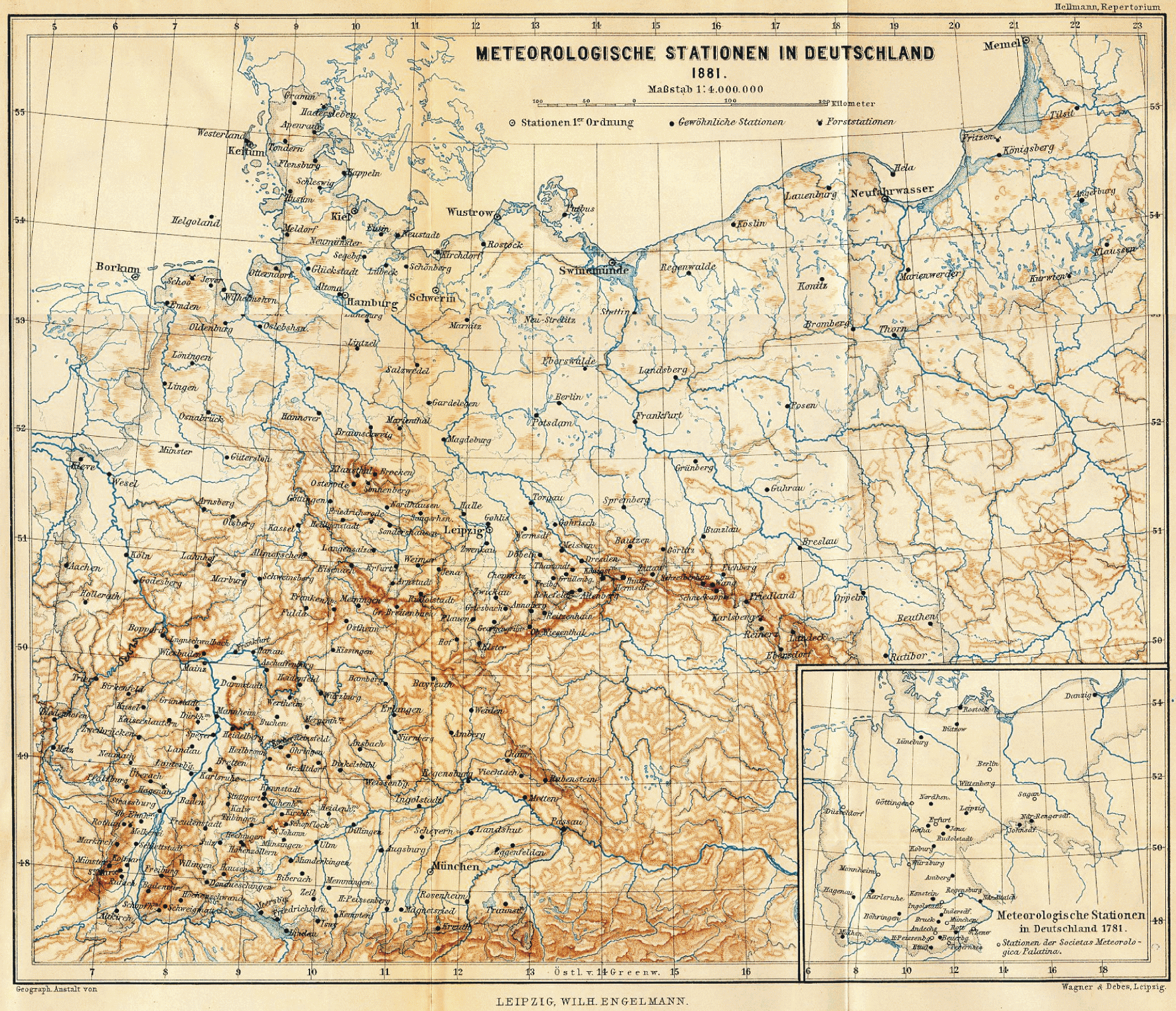 Meterologische Meßstationen im Deutschen Kaiserreich 1881